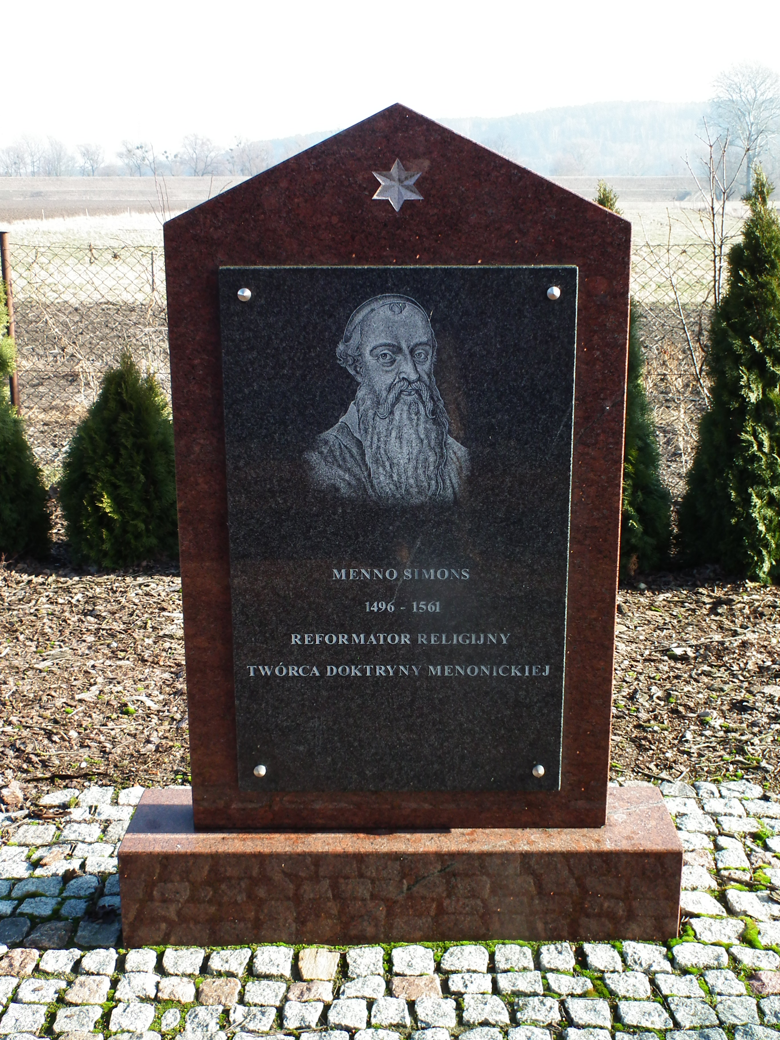 Tablica upamiętniająca Menno Simmonsa na terenie przy Kościele NMP Królowej Polski w Mątawach (pomennonickim). Commemorative plaque in honor of Menno Simons at the churchyard of Virgin Mary Queen of Poland church in Mątawy